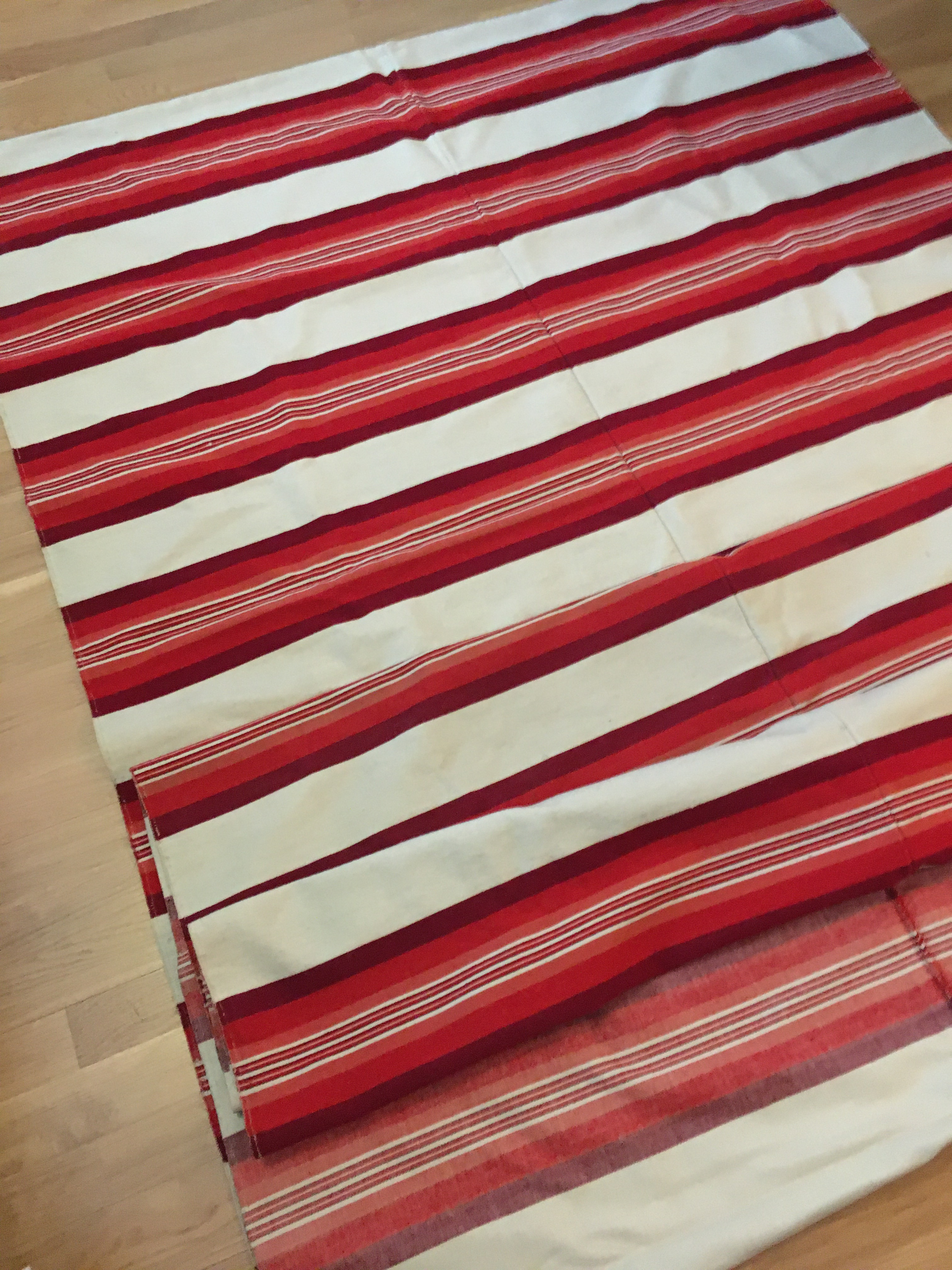 bolstervar